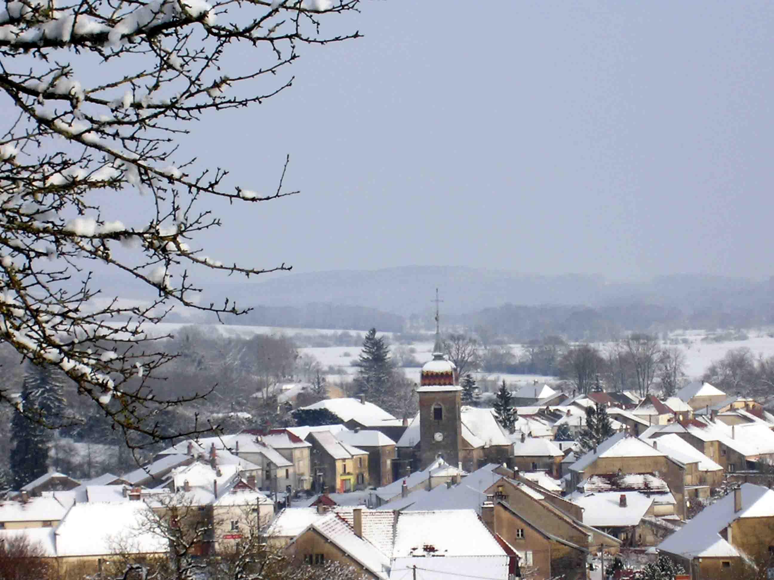 Vue du village de Vernois sur Mance